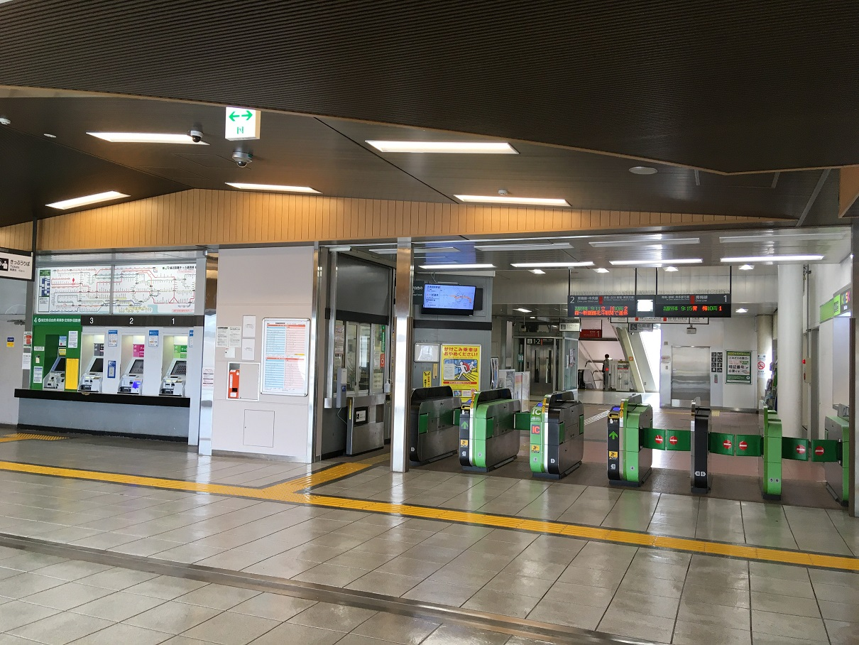 羽村駅改札口（改装後）